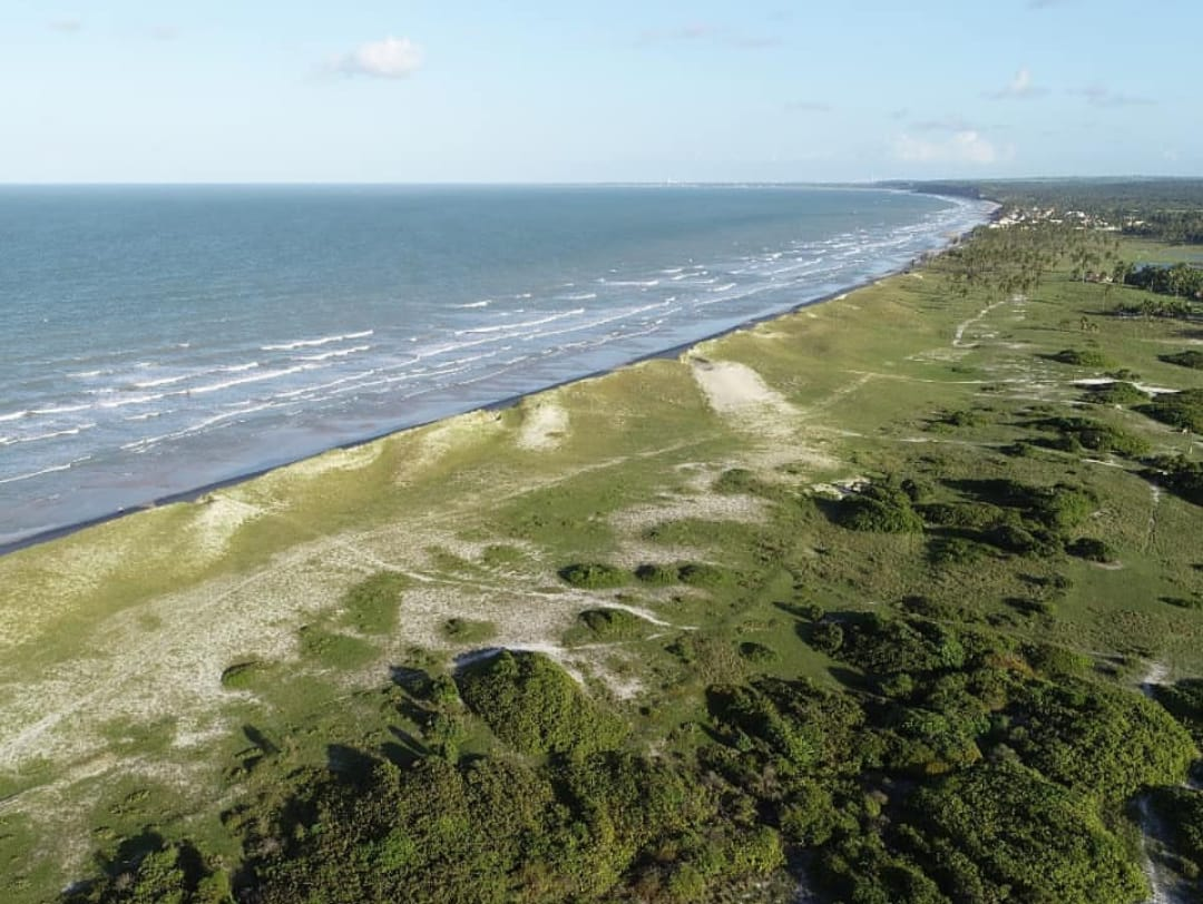 Lagoa de praia rio tinto paraiba